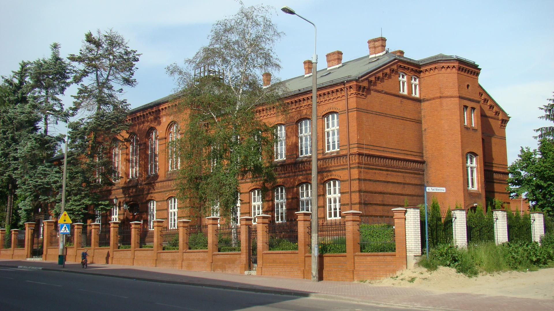 Budynek I Liceum Ogólnokształcącego im. Marii Skłodowskiej-Curie znajdujący się przy ul. Hallera 34.